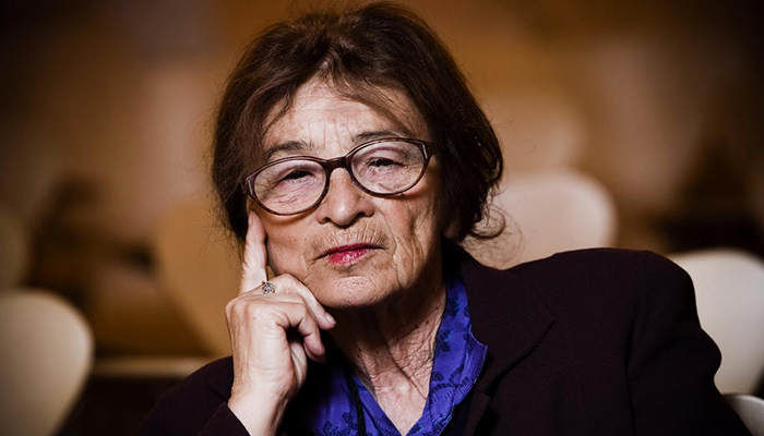 Madjarski filozof